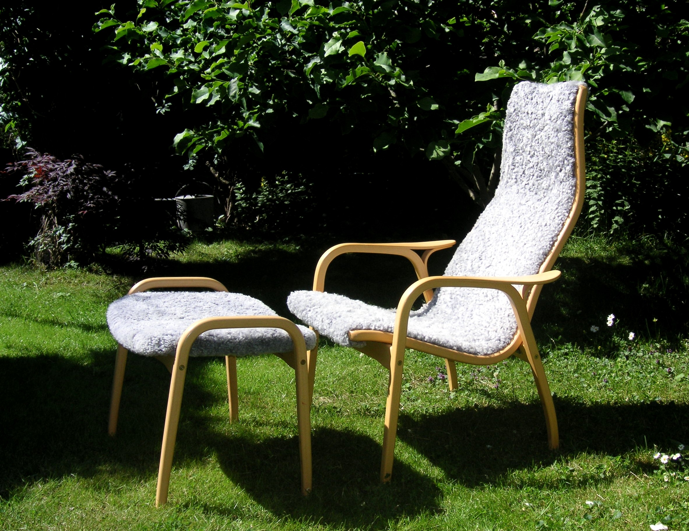 Klassikern "LAMINO" från 1956